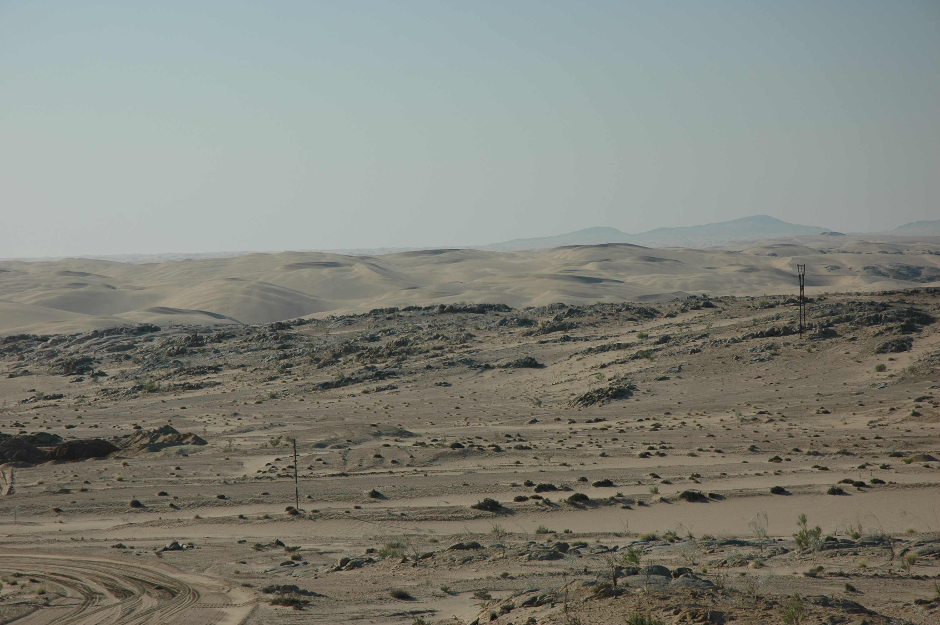 Namibie Le désert avant Lüderitz Photographie prise par Patrick GIRAUD